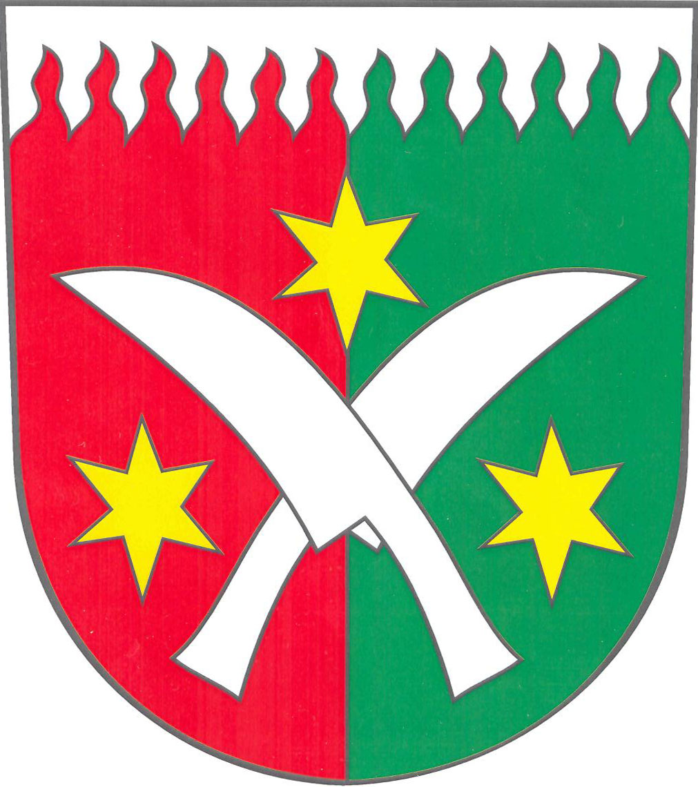 Znak obce Žďár v okrese Blansko